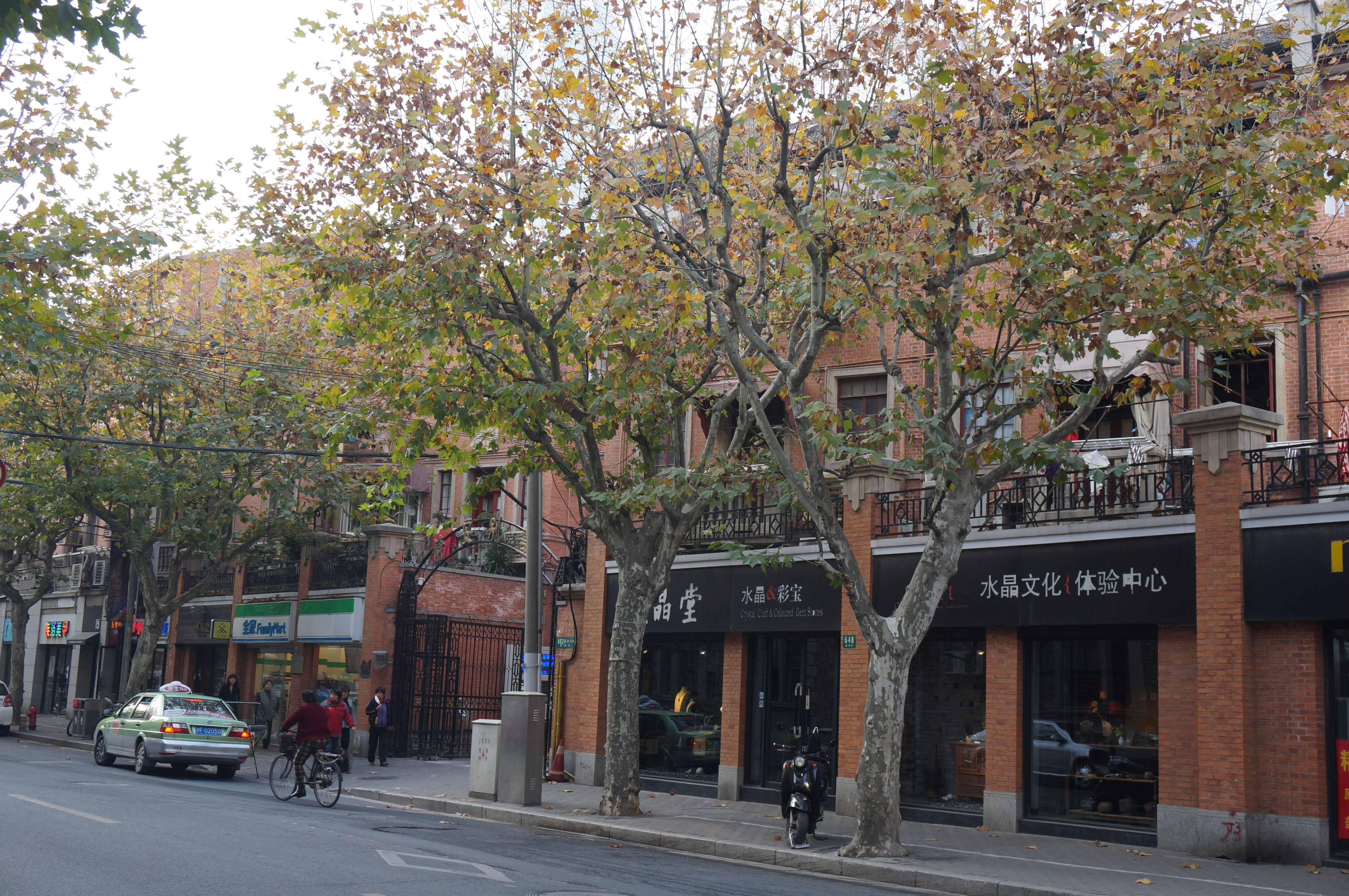 静安别墅沿路楼房